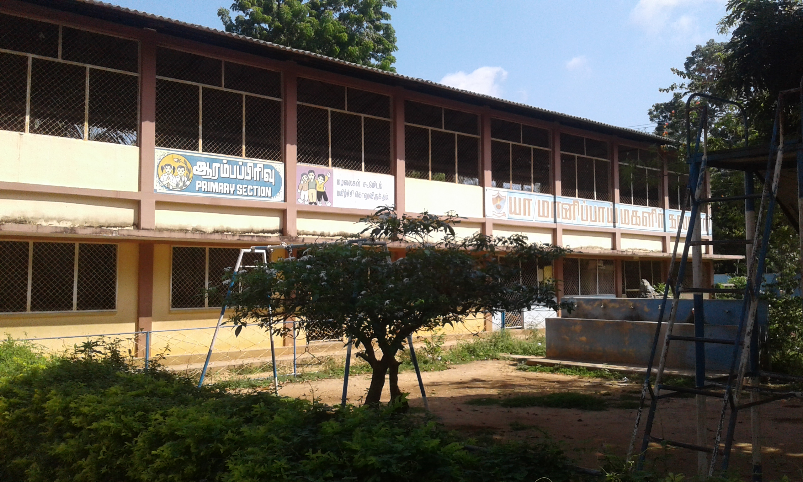 கல்லூரியின் ஆரம்ப பாடசாலை